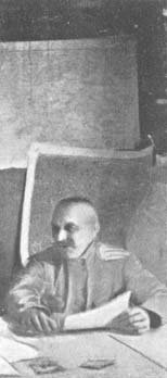 Полковник А.Г. Биттенбиндер в полевом штабе марковской дивизии, Белгород, июль 1919 года